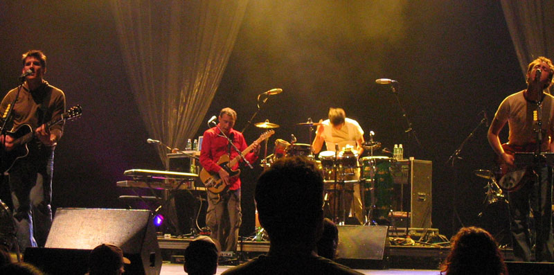 Guster au FleetBoston Pavilion le fr:11 juillet fr:2004.